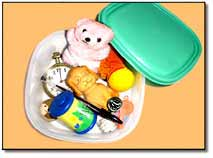 Cist contents